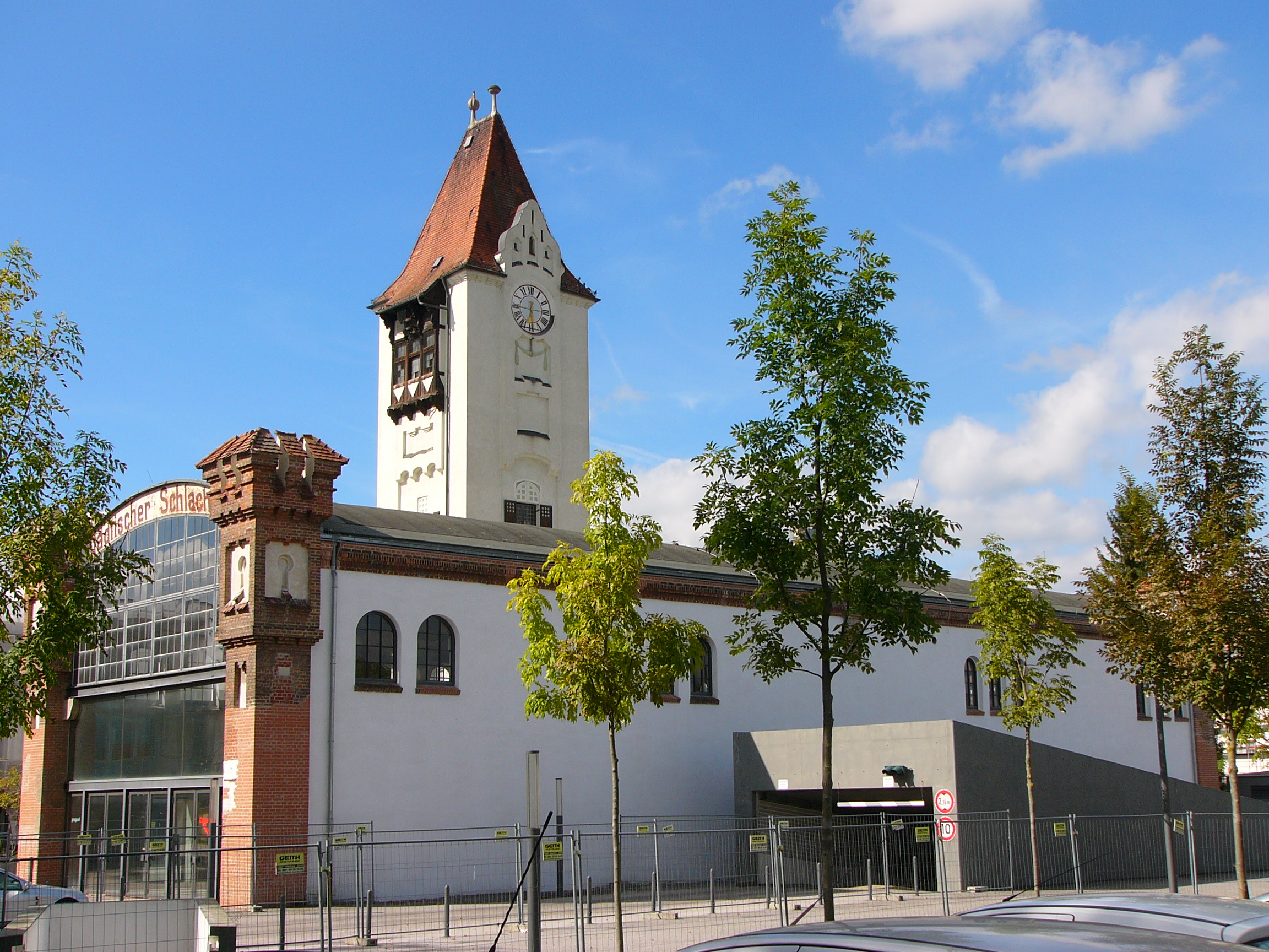 Ehem. Durchfahrts- und Beladehalle, zweigeschossige Halle mit segmentbogenförmigem Dach über ebensolchen Holzfachwerkbindern, konstruktive Elemente der Wände und turmartige Fassadenpfeiler in Sicht-, z.T. Ziermauerwerk, mit Putzfeldern, beide Giebel verglast, Südgiebel bez. "Städtischer Schlachthof".This is a photograph of an architectural monument.